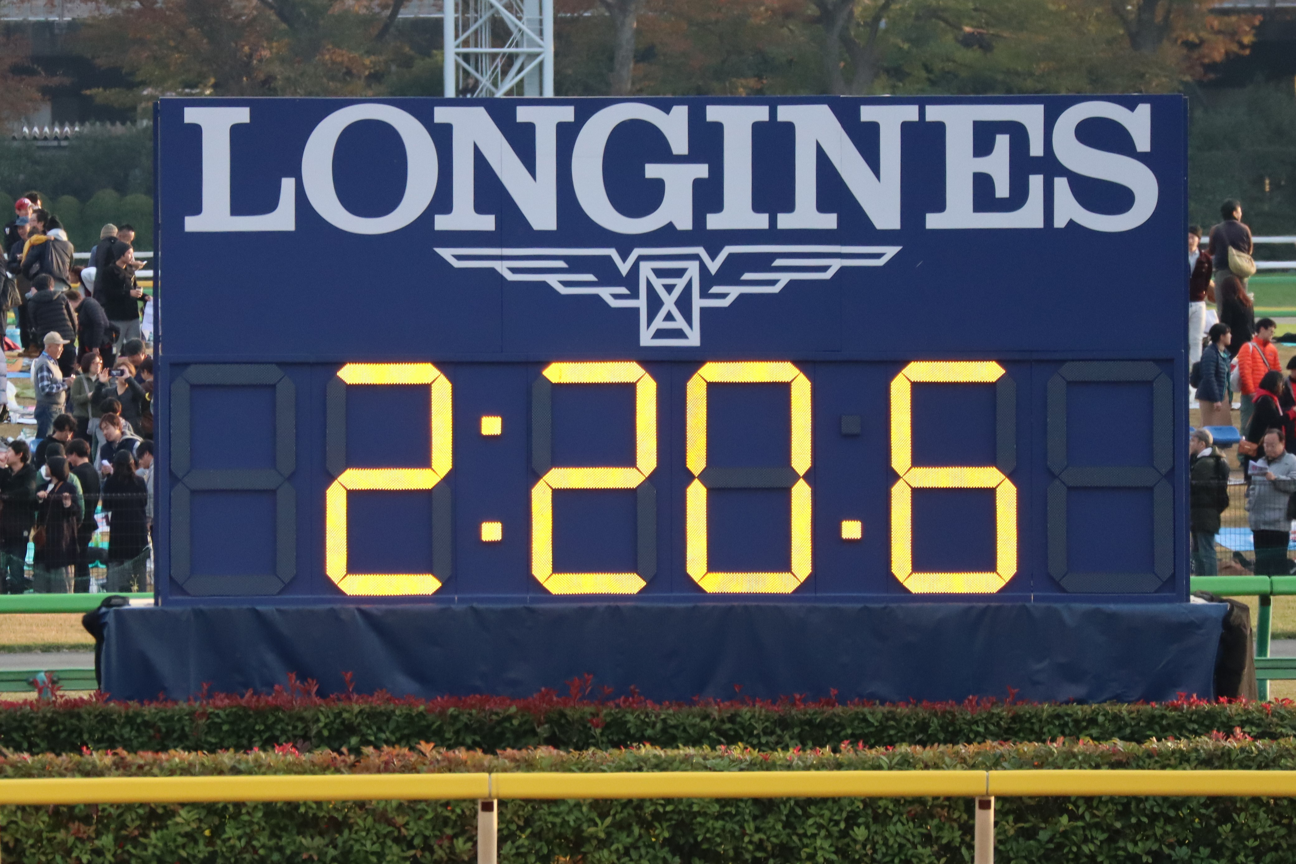 アーモンドアイが出した2:20.6の世界レコード